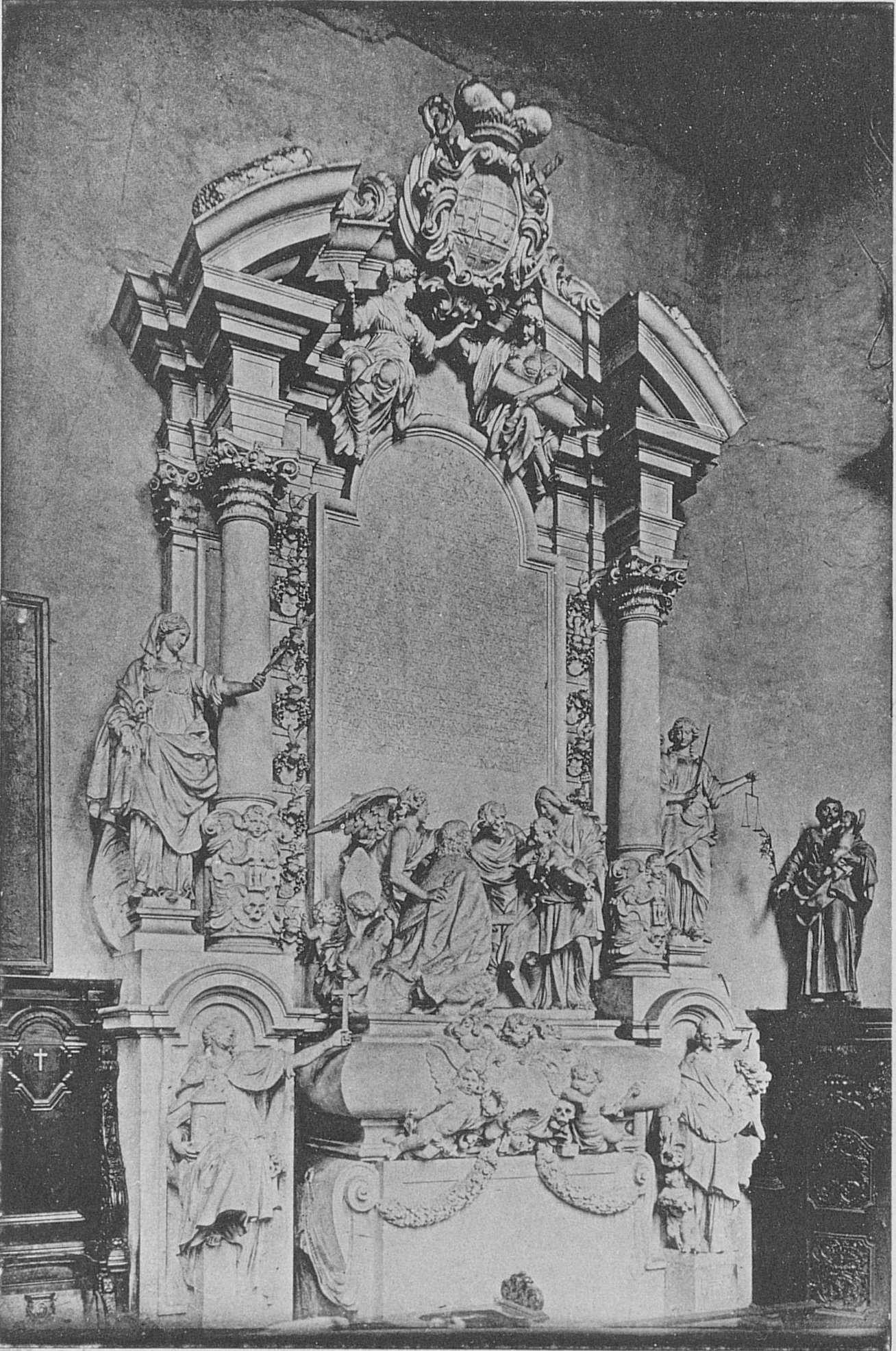 Grabmal Ferdinand von Fürstenberg (1945 zerstört)